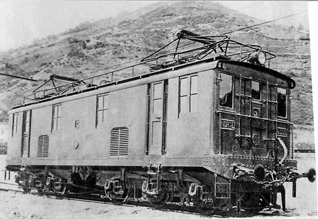 La 6006 en el puerto de Pajares